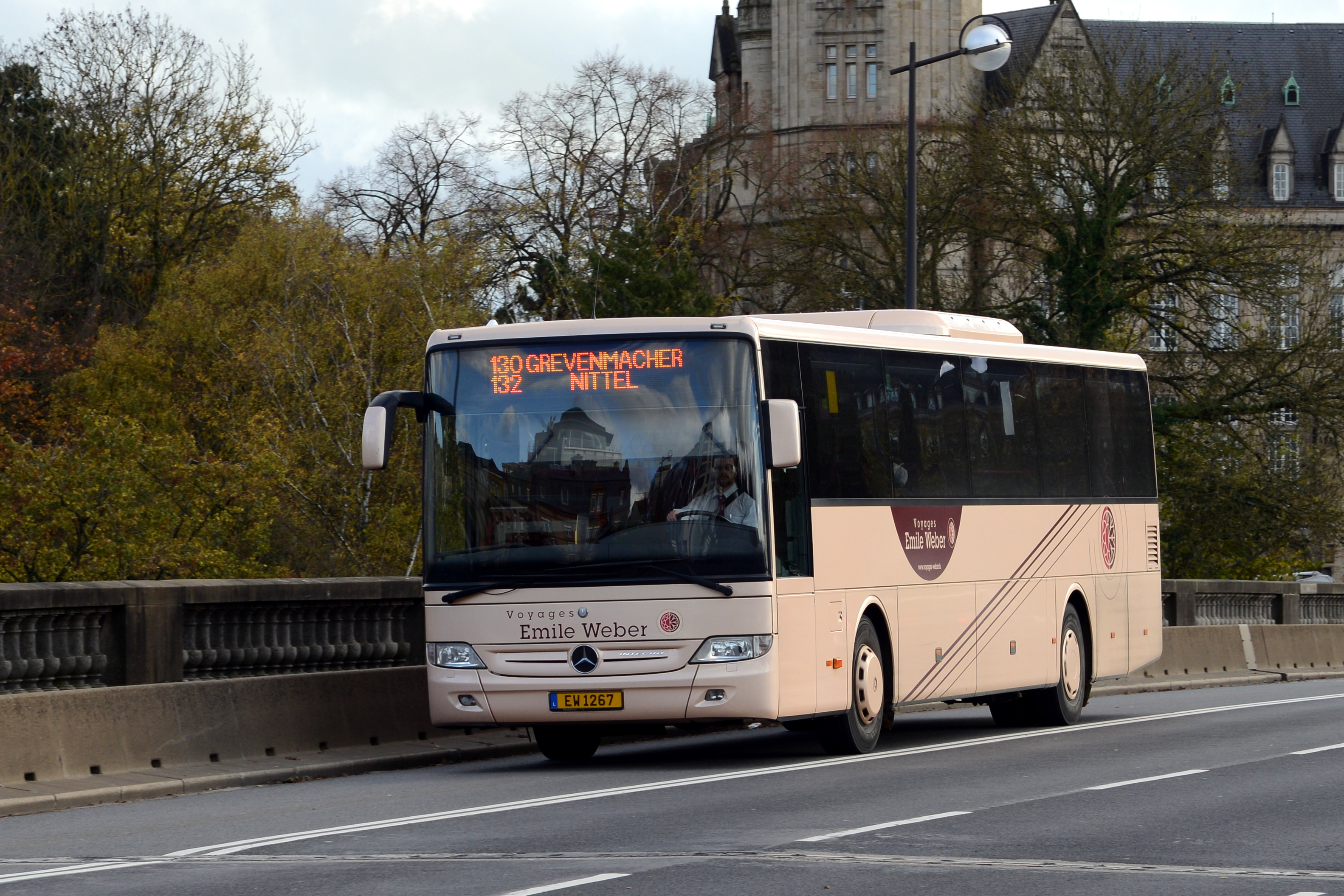 E Bus vum Voyages Weber op der Neier Bréck, November 2013.